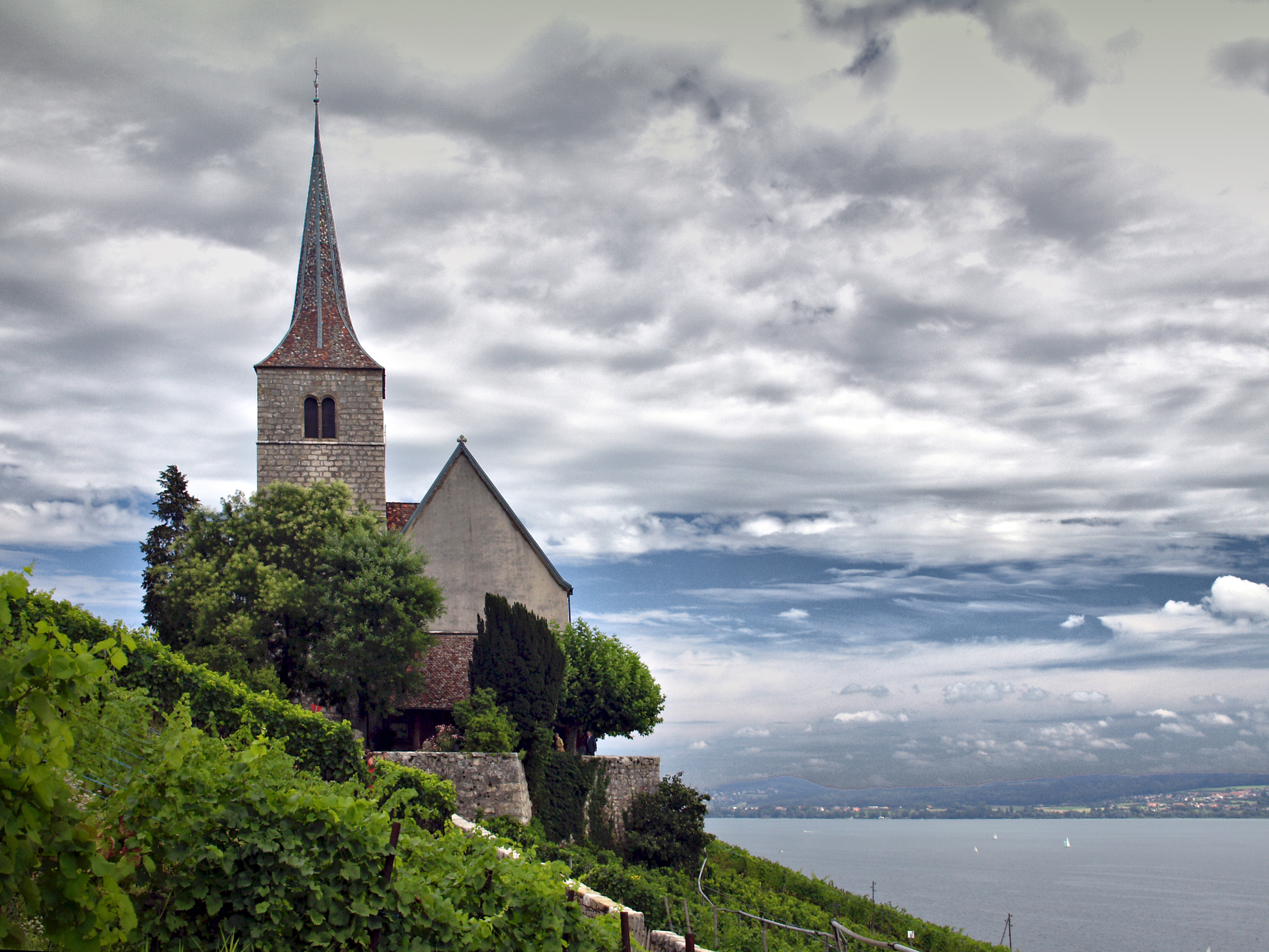 Gléresse (Suisse) - L'église de Ligerz (XVIe siècle) au milieu des vignes en coteaux